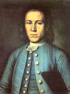 Мина Лукич Колокольников, “Портрет молодого человека в голубом кафтане” (одно из трех написанных им изображений Саввы Яковлевича Яковлева), 1730—1740-е годы (фонд Государственного Русского музея)